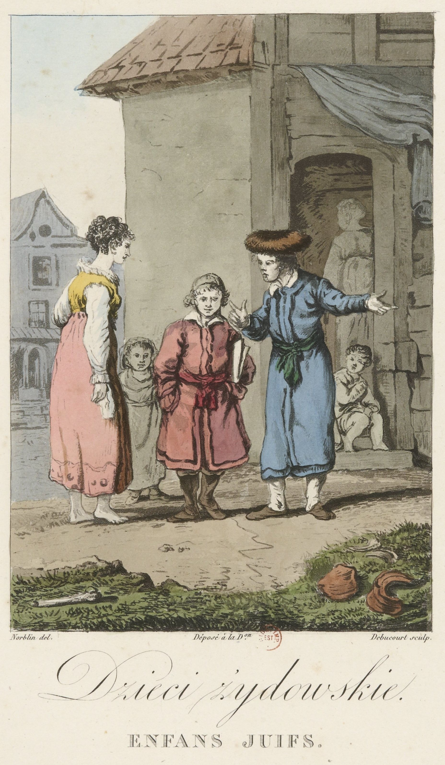 Еврейские дети